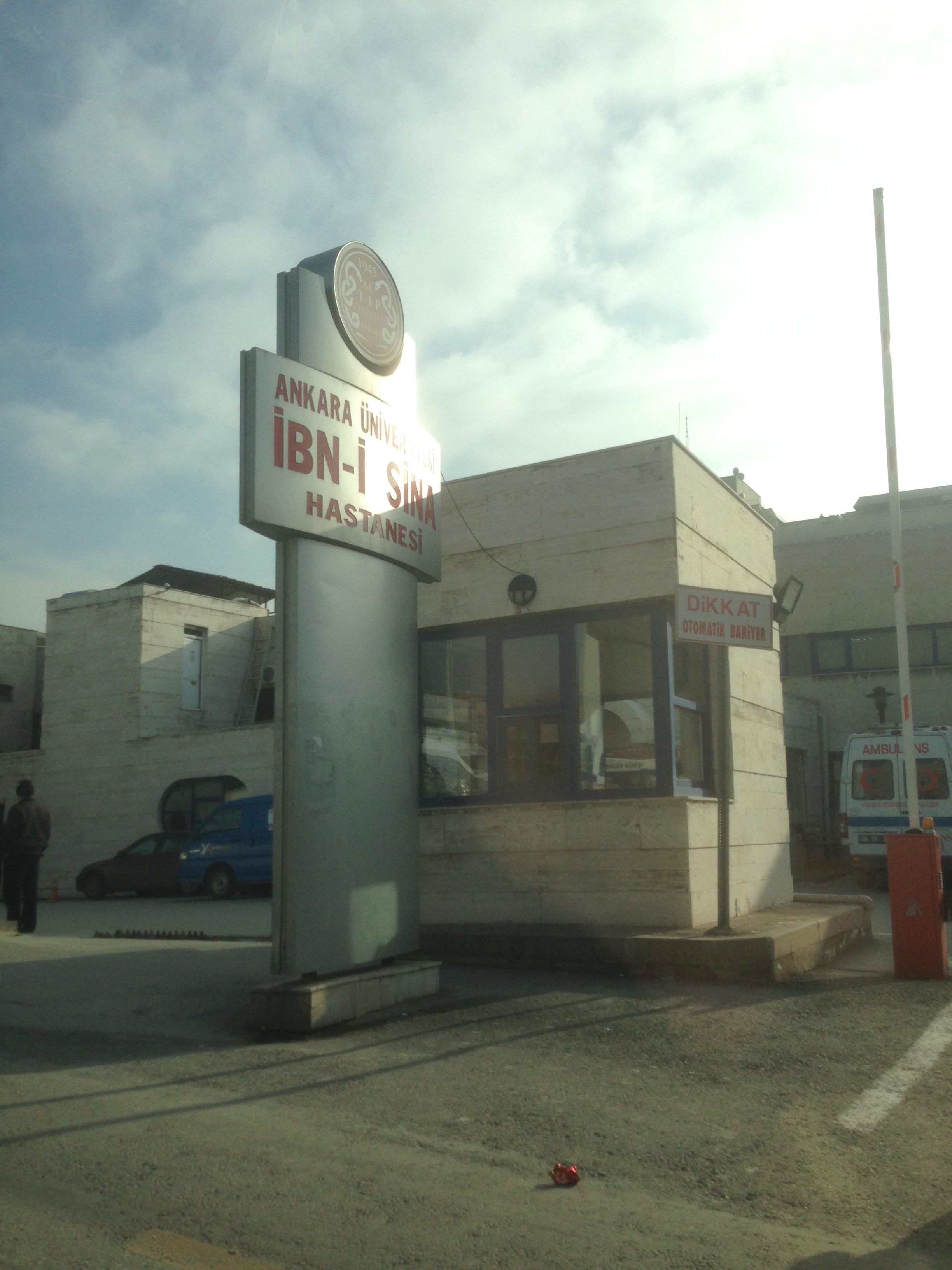 Ankara Üniversitesi İbn-i Sina Hastanesi